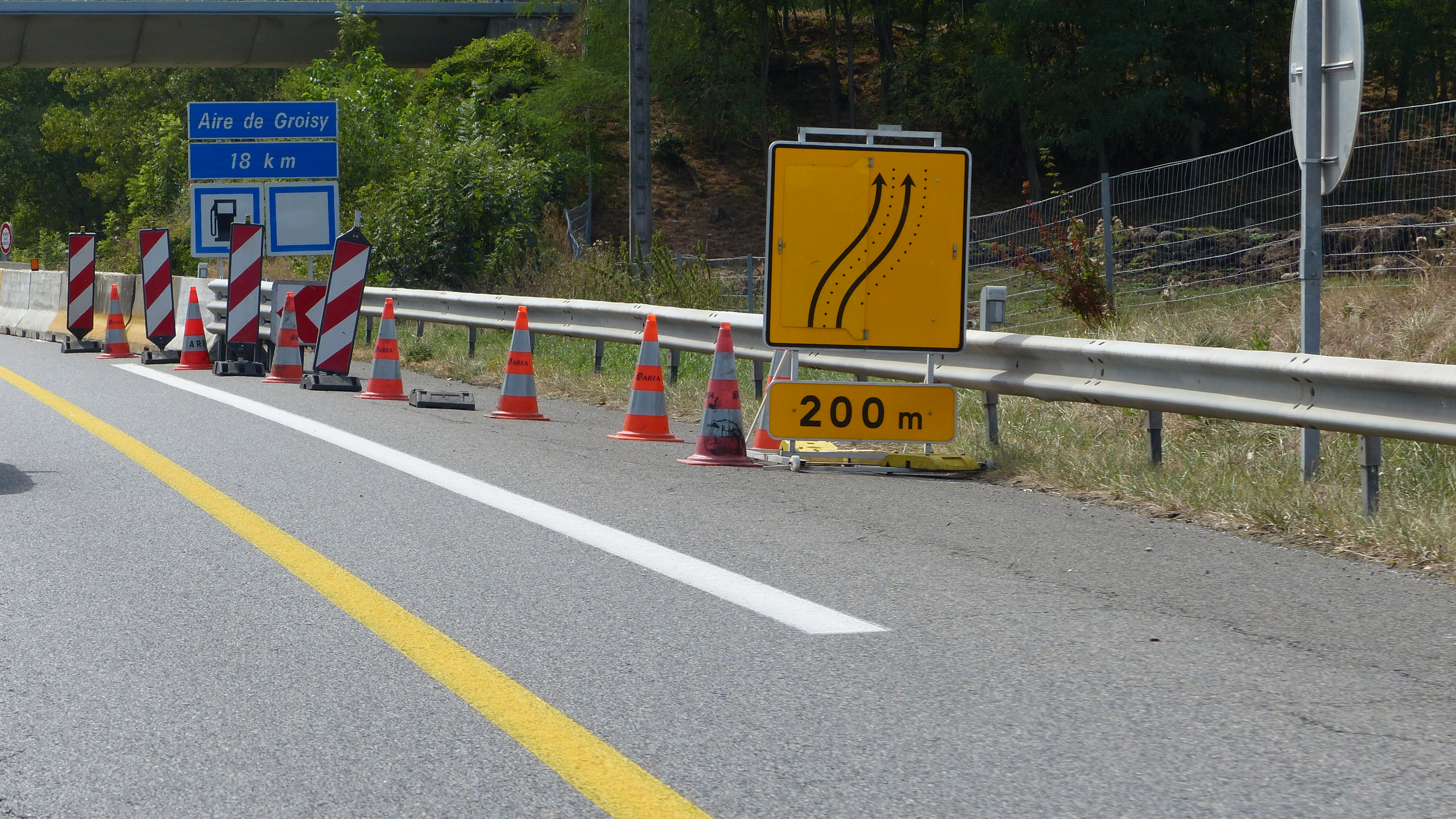 Panneau KD8, balise K5a, panonceau KM1, sur l'A410, Haute-Savoie, France.